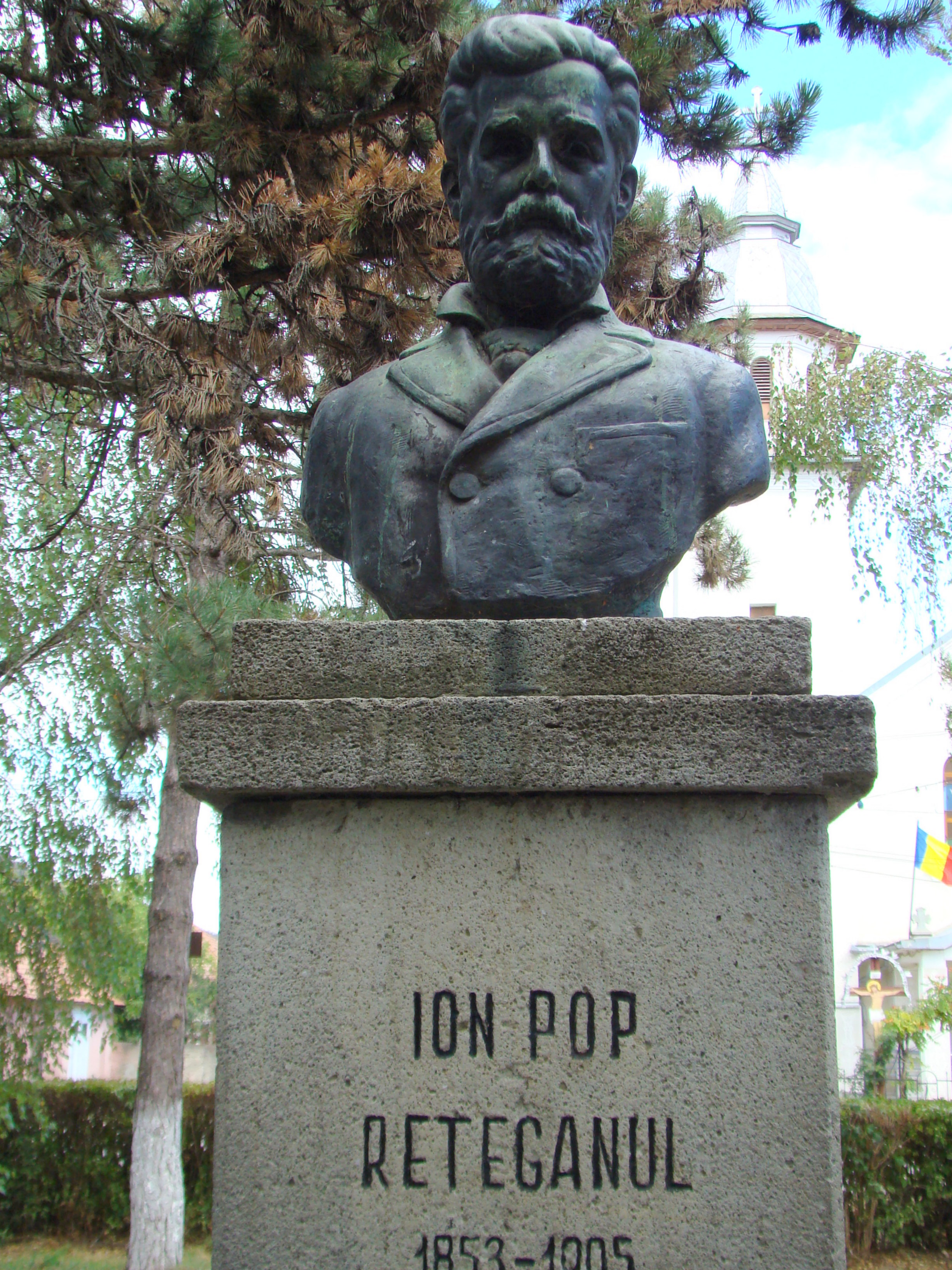 Bustul lui Ion Pop Reteganu, sat RETEAG; comuna PETRU RAREŞ